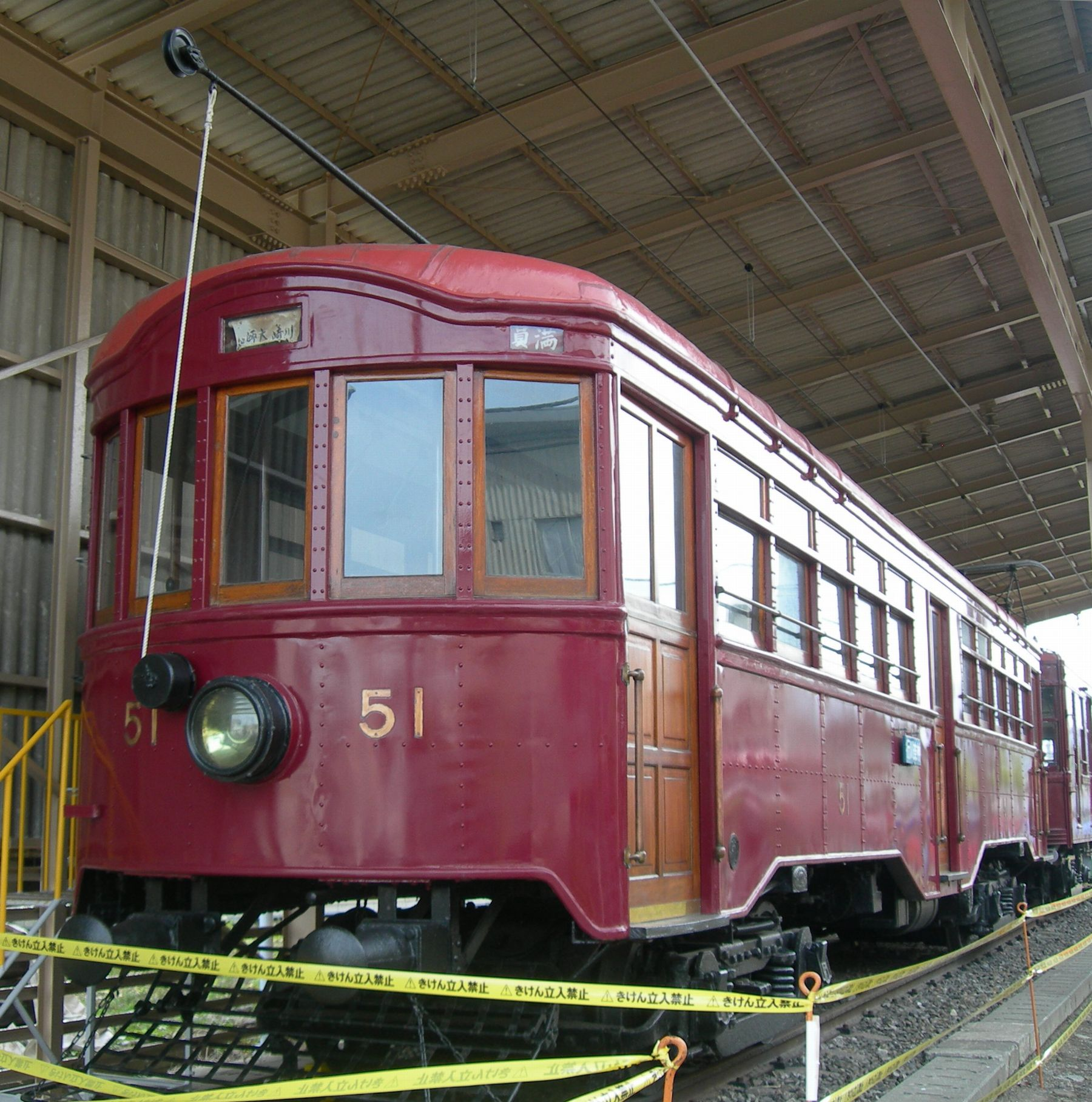 京急ファインテック久里浜事業所 で投稿者が撮影